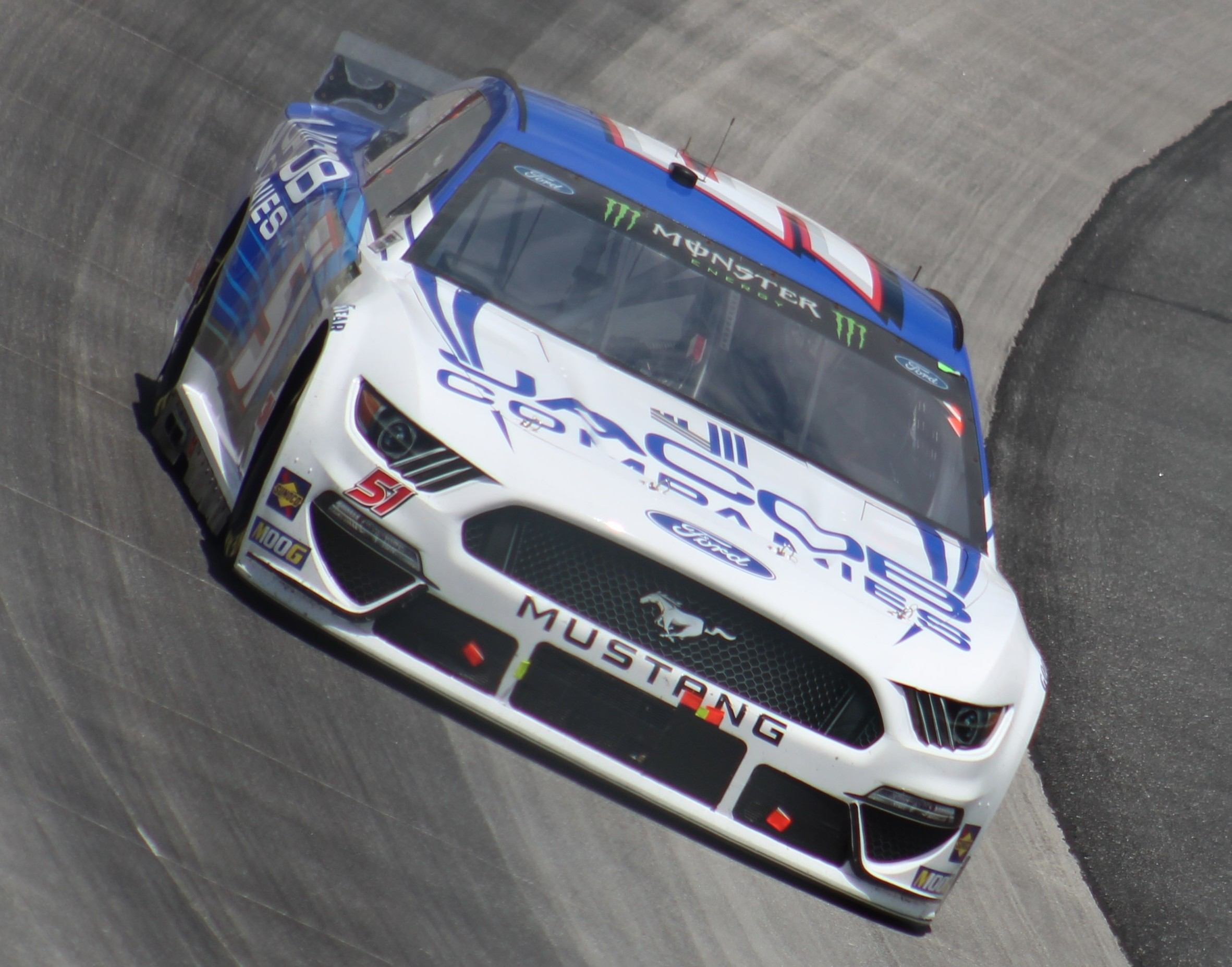 2019 Gander RV 400